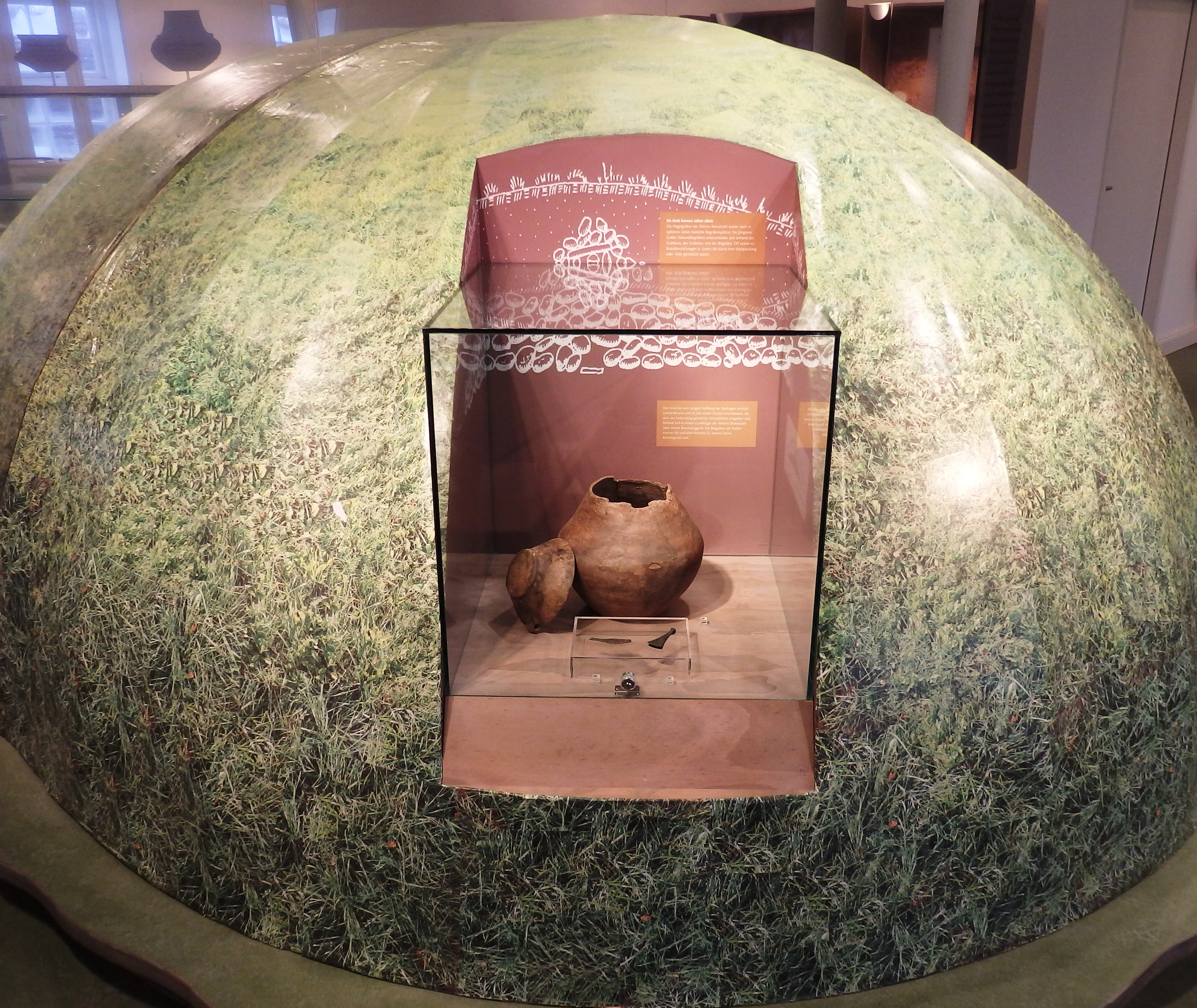 Grabhügelkonstruktion im Museum zeiTTor, Neustadt/Holstein